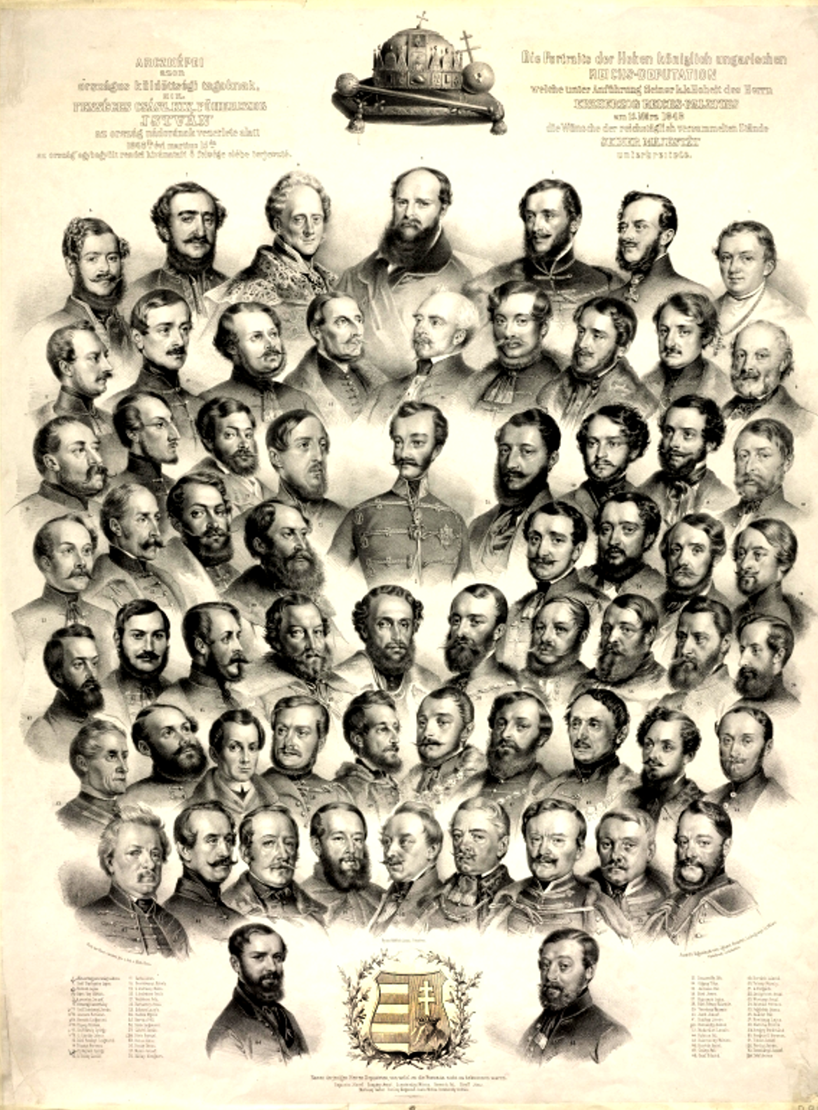 Die Portraits der Hohen königlich ungarischen Reichs-Deputation welche unter Anführung Seiner k.k. Hoheit des Herrn Erzherzog Reichs-Palatins am 15. März 1848 die Wünsche der reichstäglich versammelten Stände seiner Majestät unterbreitete